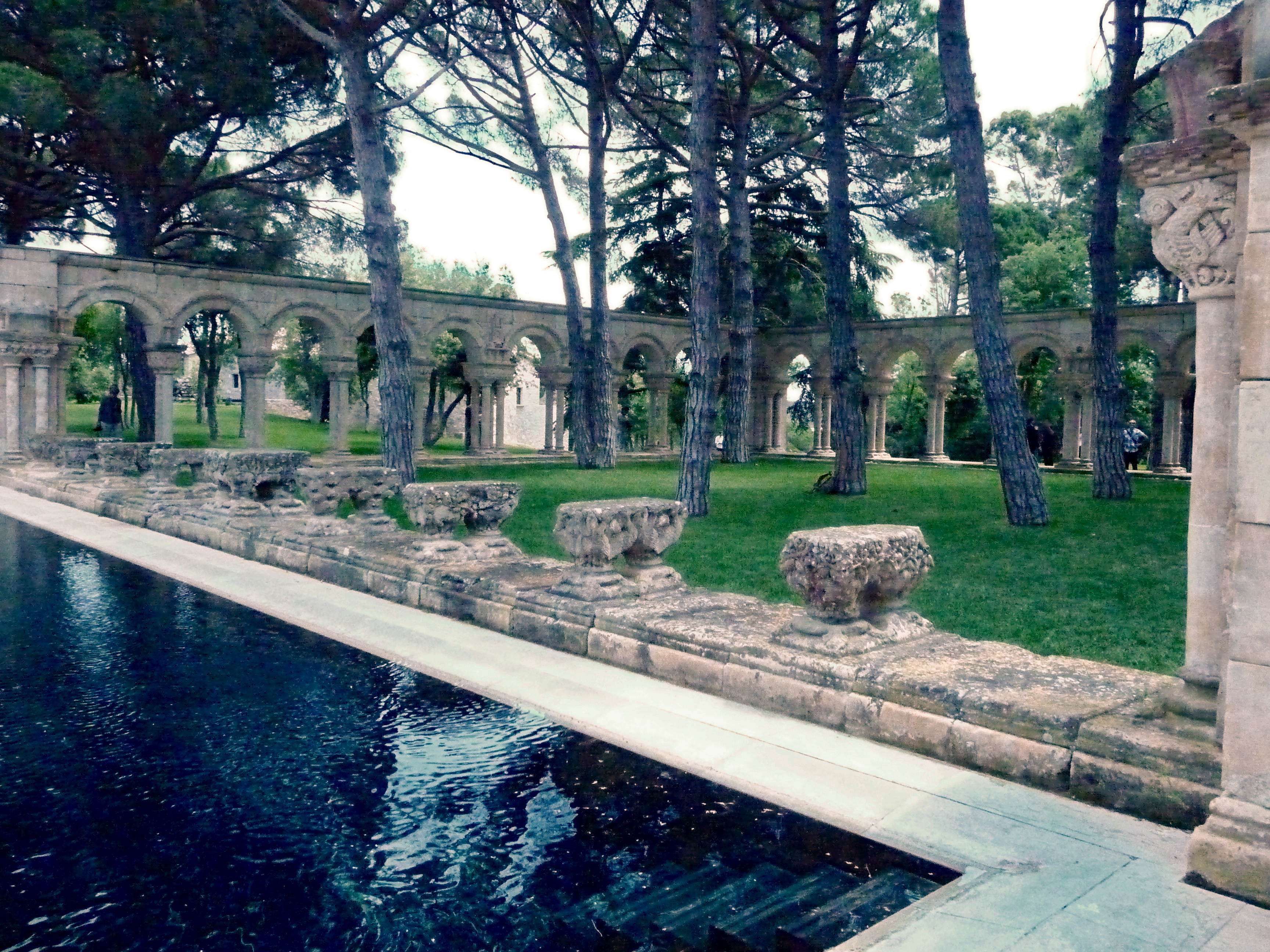 Claustre romànic del Mas del Vent de Palamós